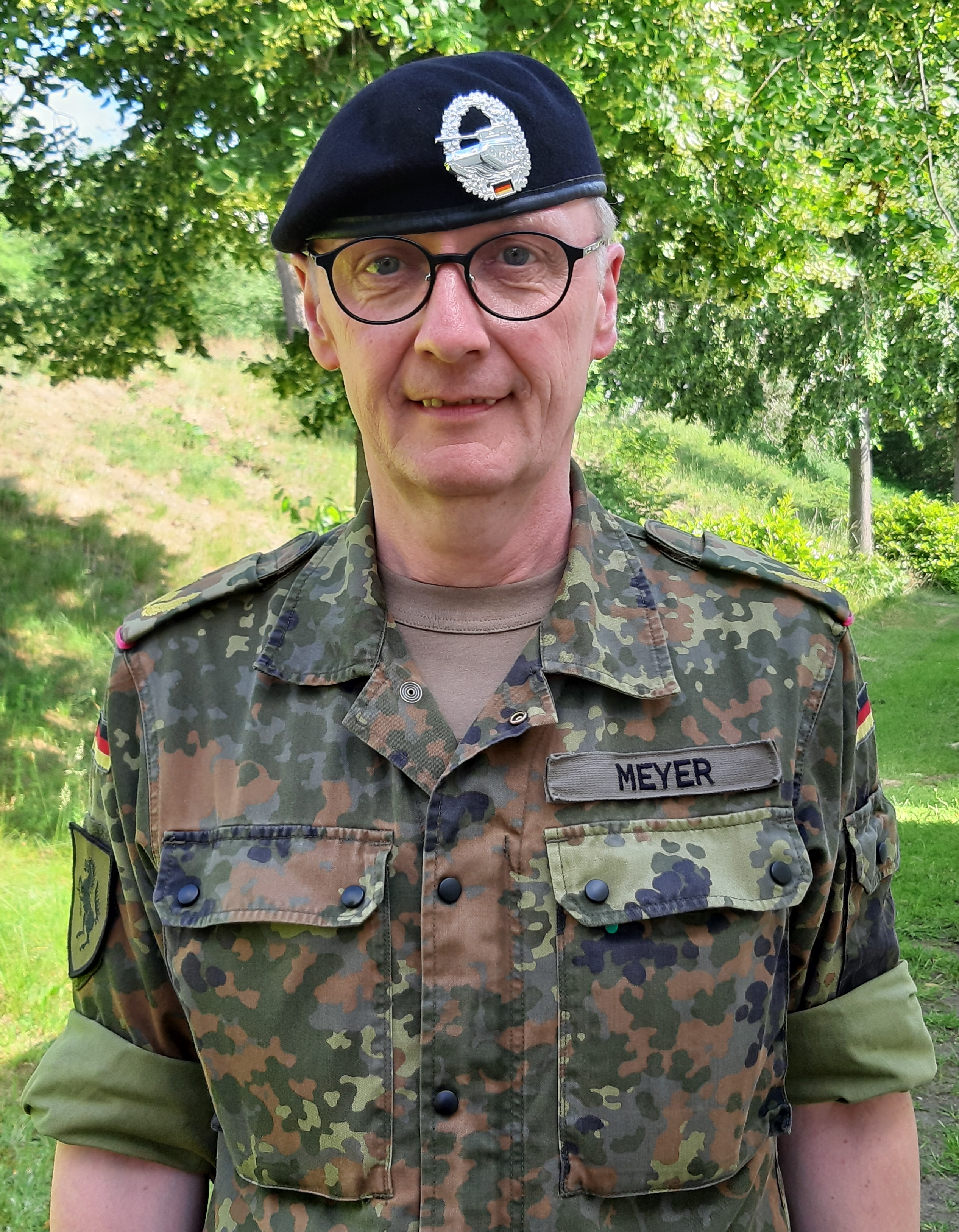 Ansgar Meyer (2019)